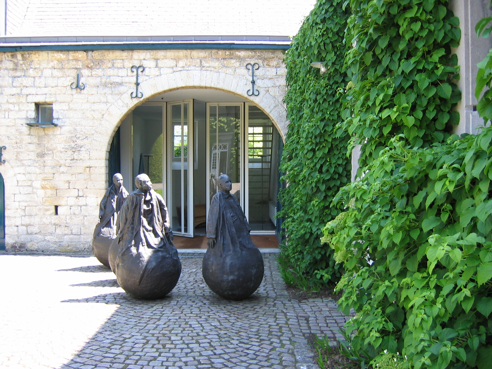 Juan Munoz, Conversation piece Kasteel Wijlre, Limburg NL Marlies en Jo Eijck-Voncken Kasteel Wijlre Kasteel Wijlreweg 1 6321 PP Wijlre